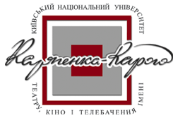 Логотип Київського національного університету театру, кіно і телебачення імені Івана Карпенка-Карого.